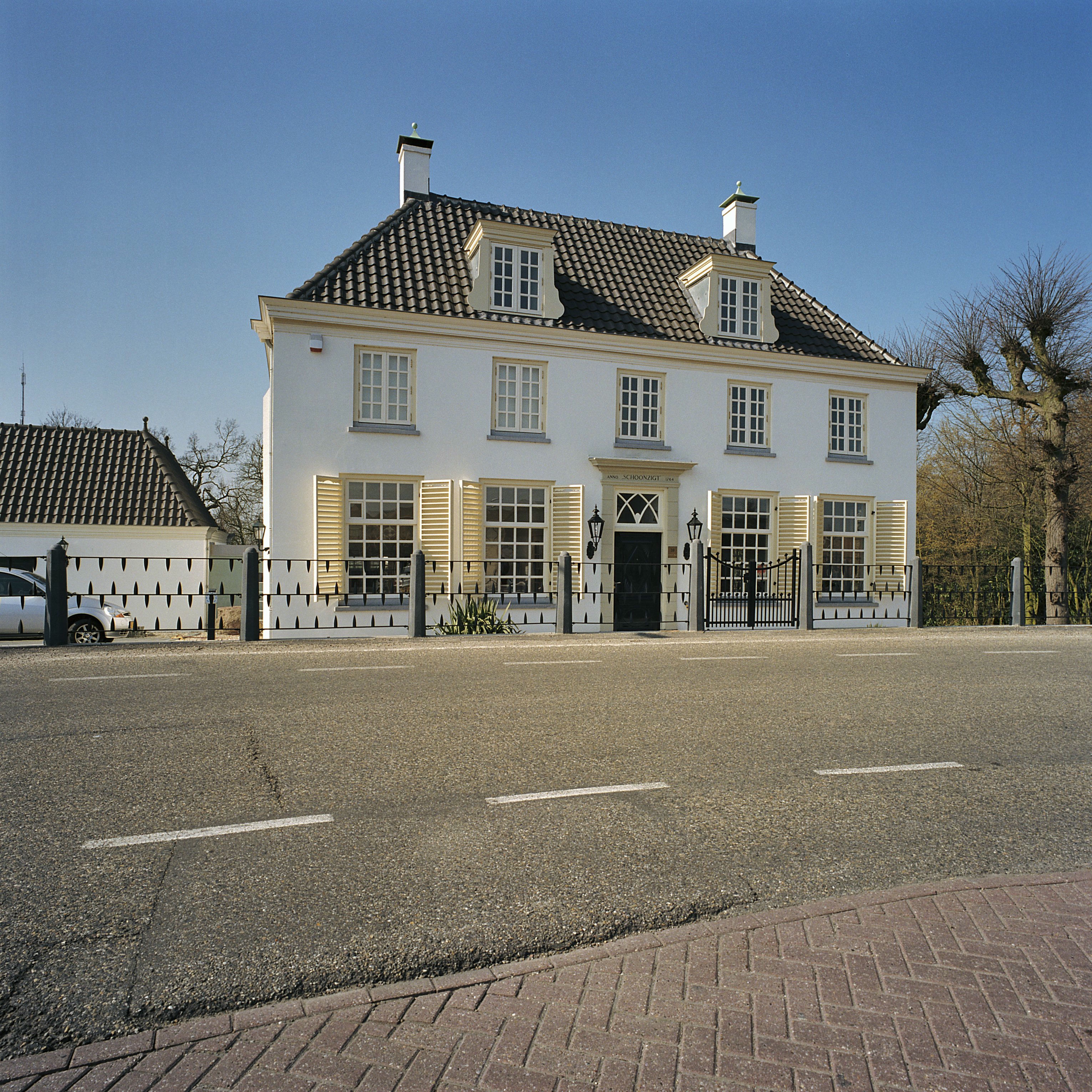 Herenhuis Schoonzicht: Overzicht voorgevel (opmerking: Gefotografeerd voor Monumenten In Nederland Zuid-Holland)